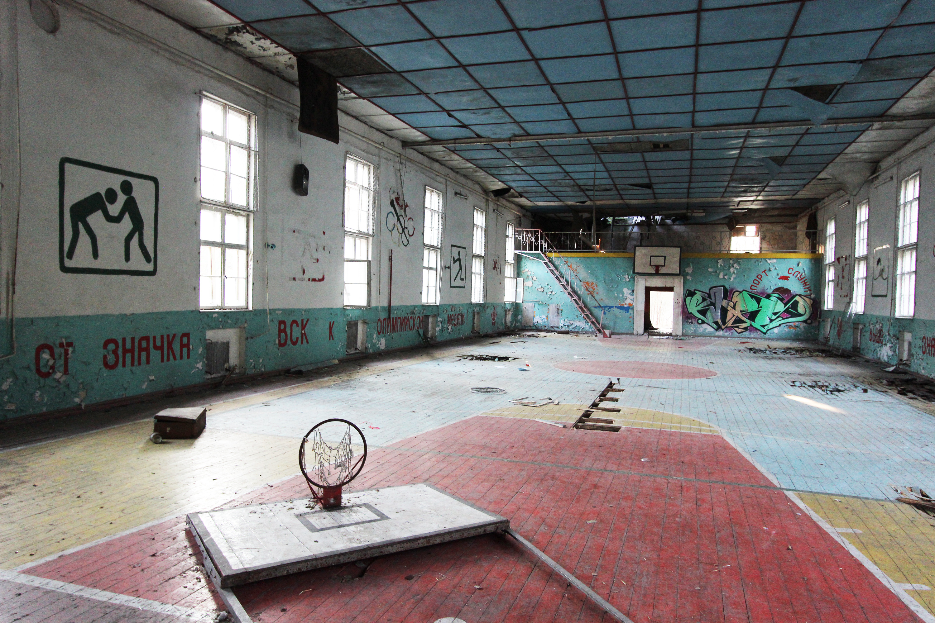 Sporthalle, ehemaliges GSSD-Gelände in Vogelsang, 2015